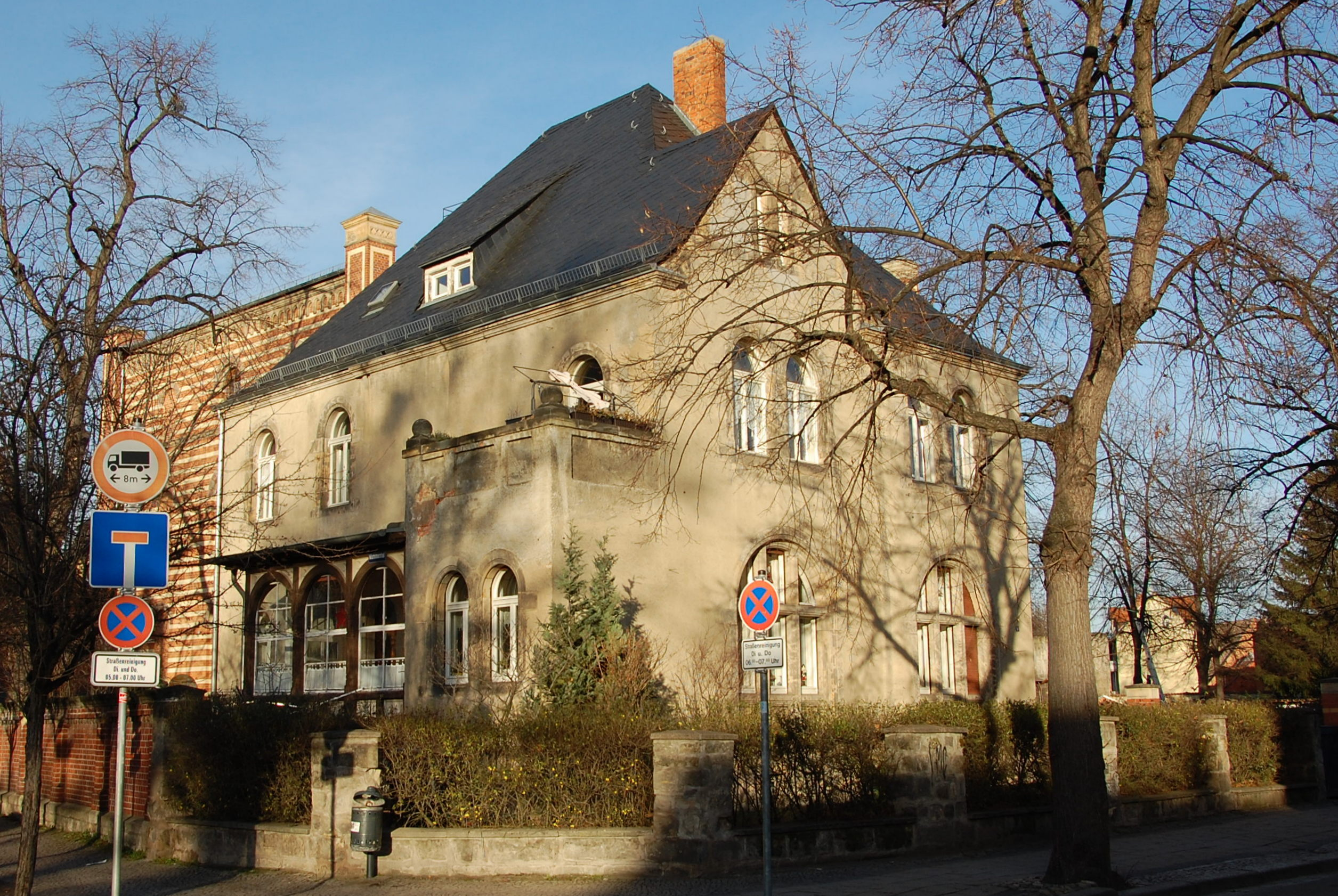 Haus Heiligegeiststraße 8, 8a in Quedlinburg